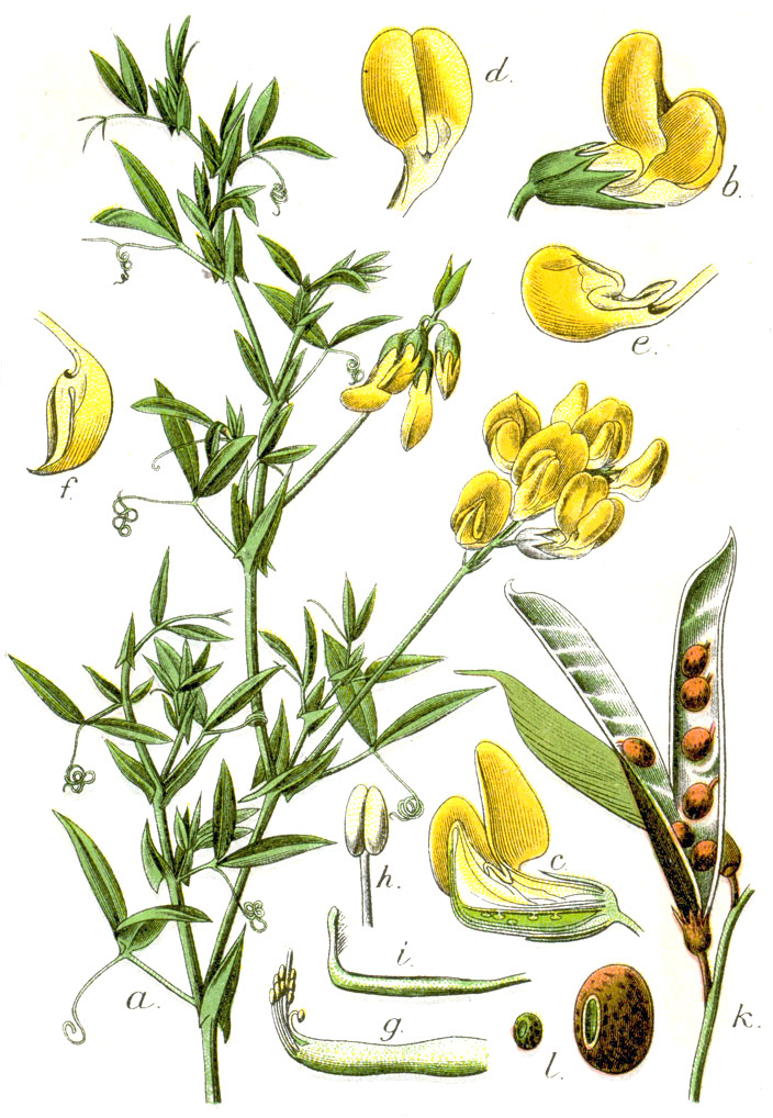 FloraWeb.de: Wiesen-Platterbse, Lathyrus pratensis L. Original Caption Wiesenerbse, Pisum pratense